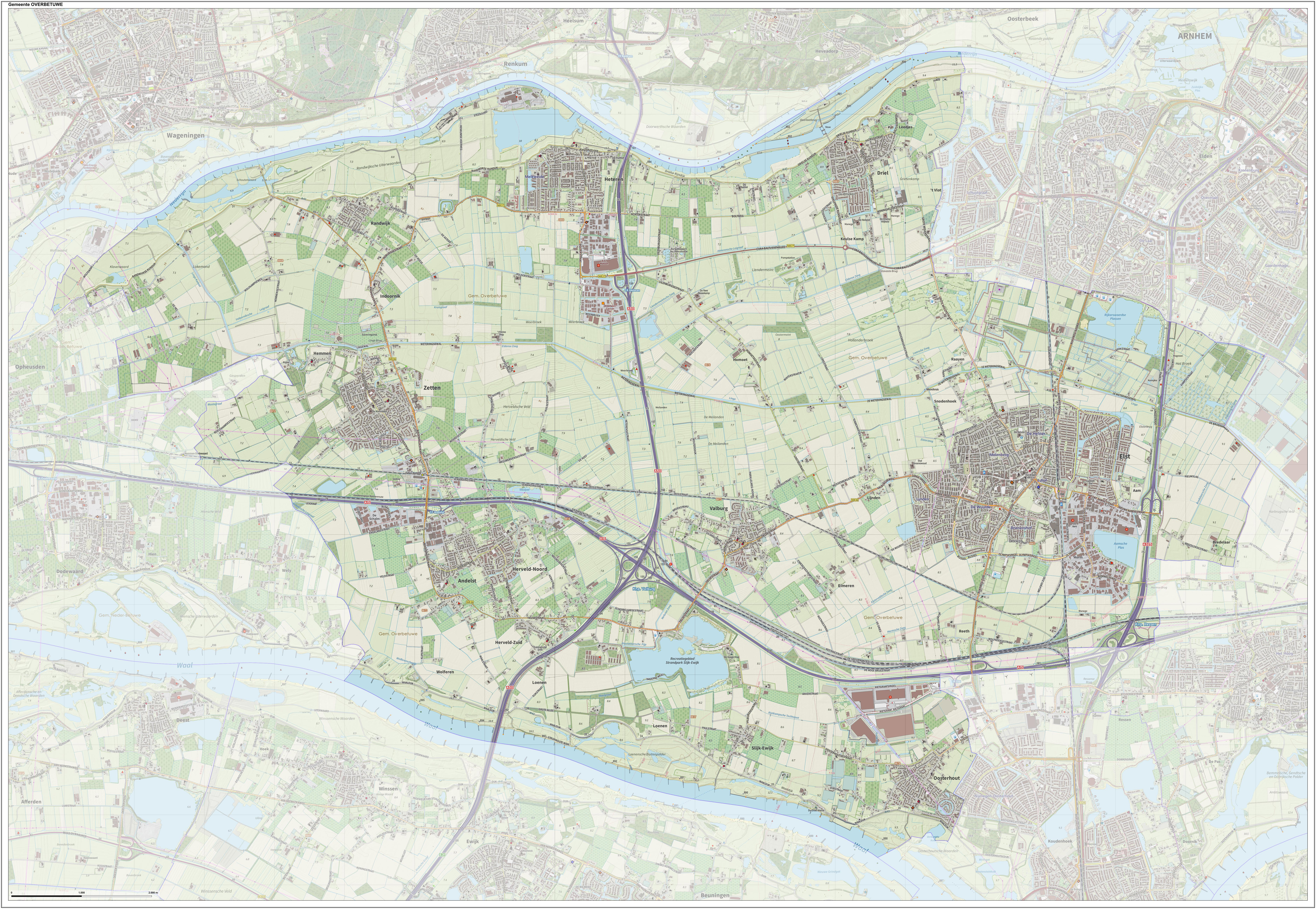 Topografische gemeentekaart. Resolutie: 400 pixels/km. Kaartbeeld samengesteld uit de open geodata van de Top10NL en Top25namen (Kadaster), Creative Commons-BY licentie. Gebouwvlakken uit open geodata BAG extract. Wegen uit de OpenStreetMap, OpenStreetMap community. Reliëfschaduw uit de Actuele Hoogtekaart AHN2. Samenstelling en kleurenschema: Jan-Willem van Aalst, met QGIS. Zie ook de Legenda.